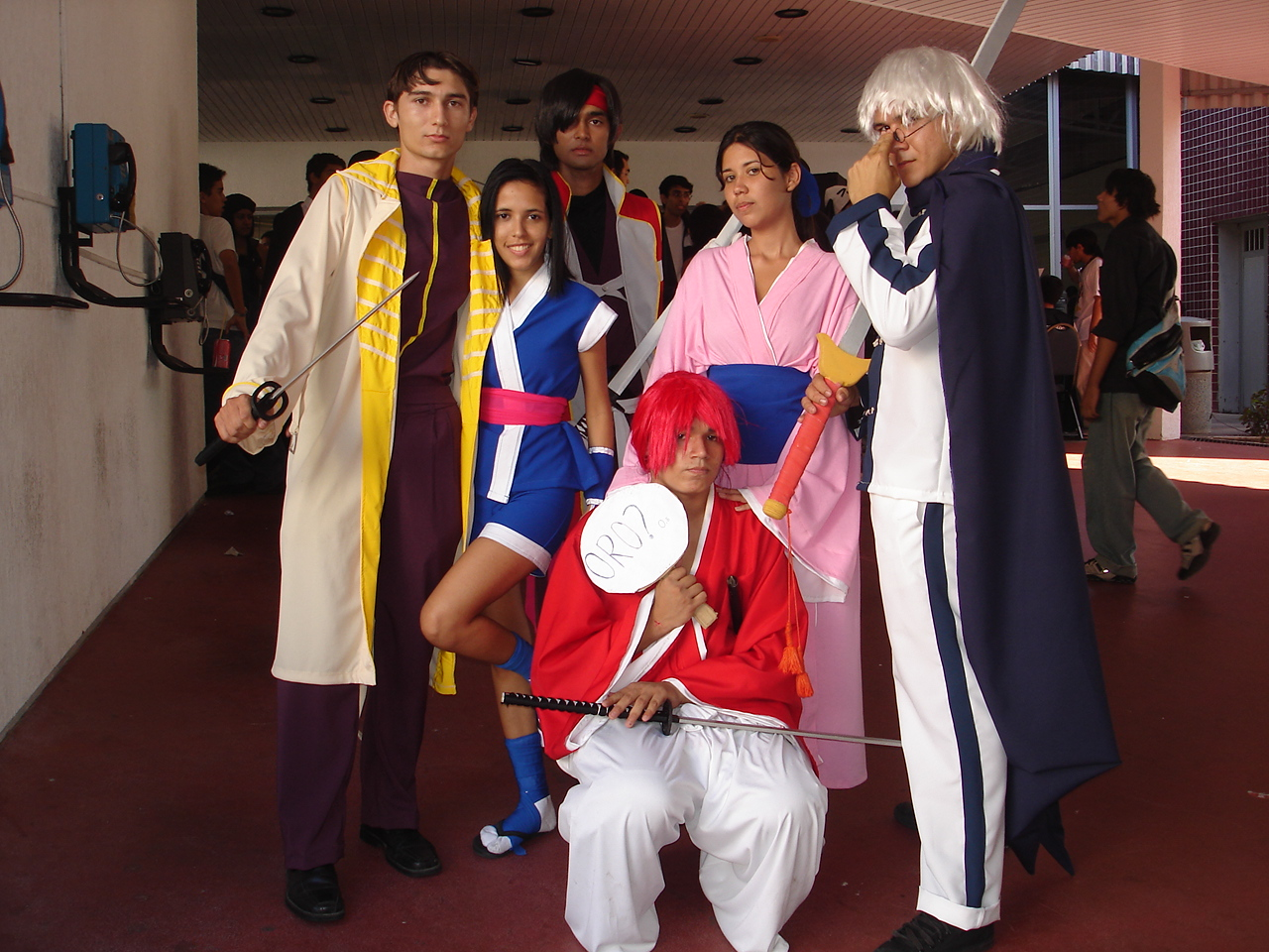 grupo Rurouni Kenshin (Samurai X)...Foto Tirada no SANA7